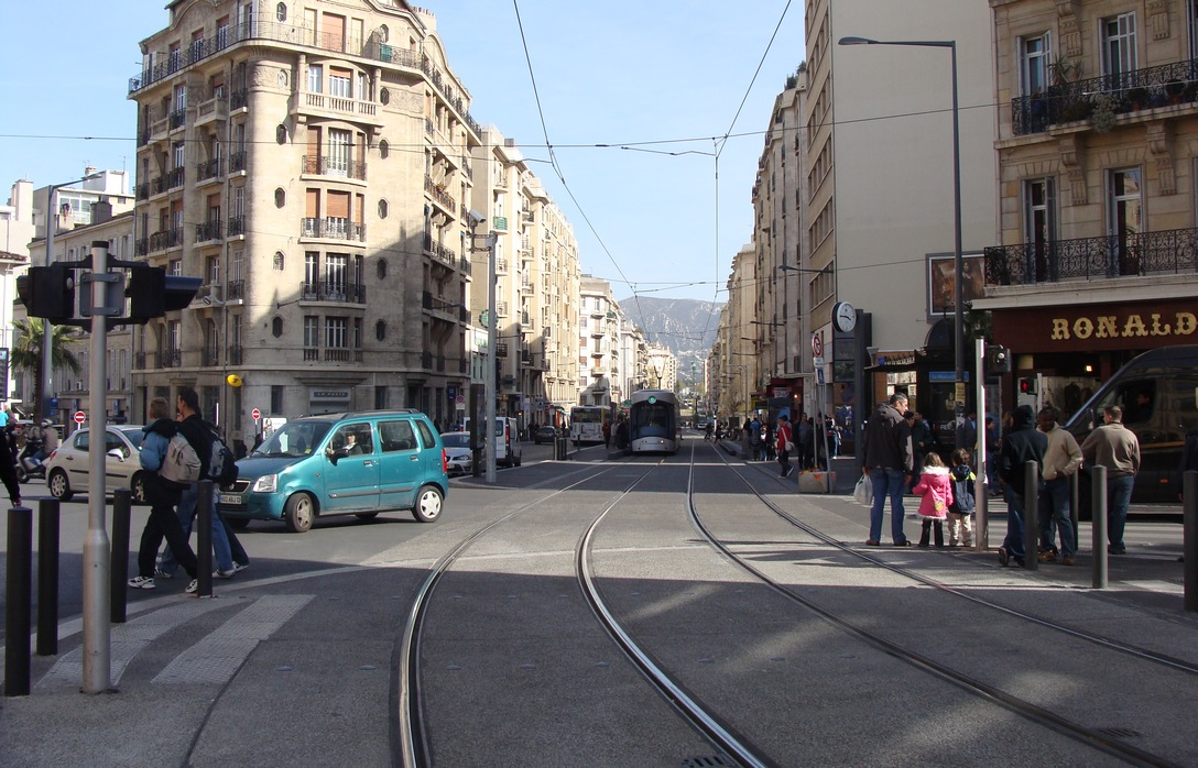 Le carrefour des Cinq-Avenues traversé par la ligne du tram